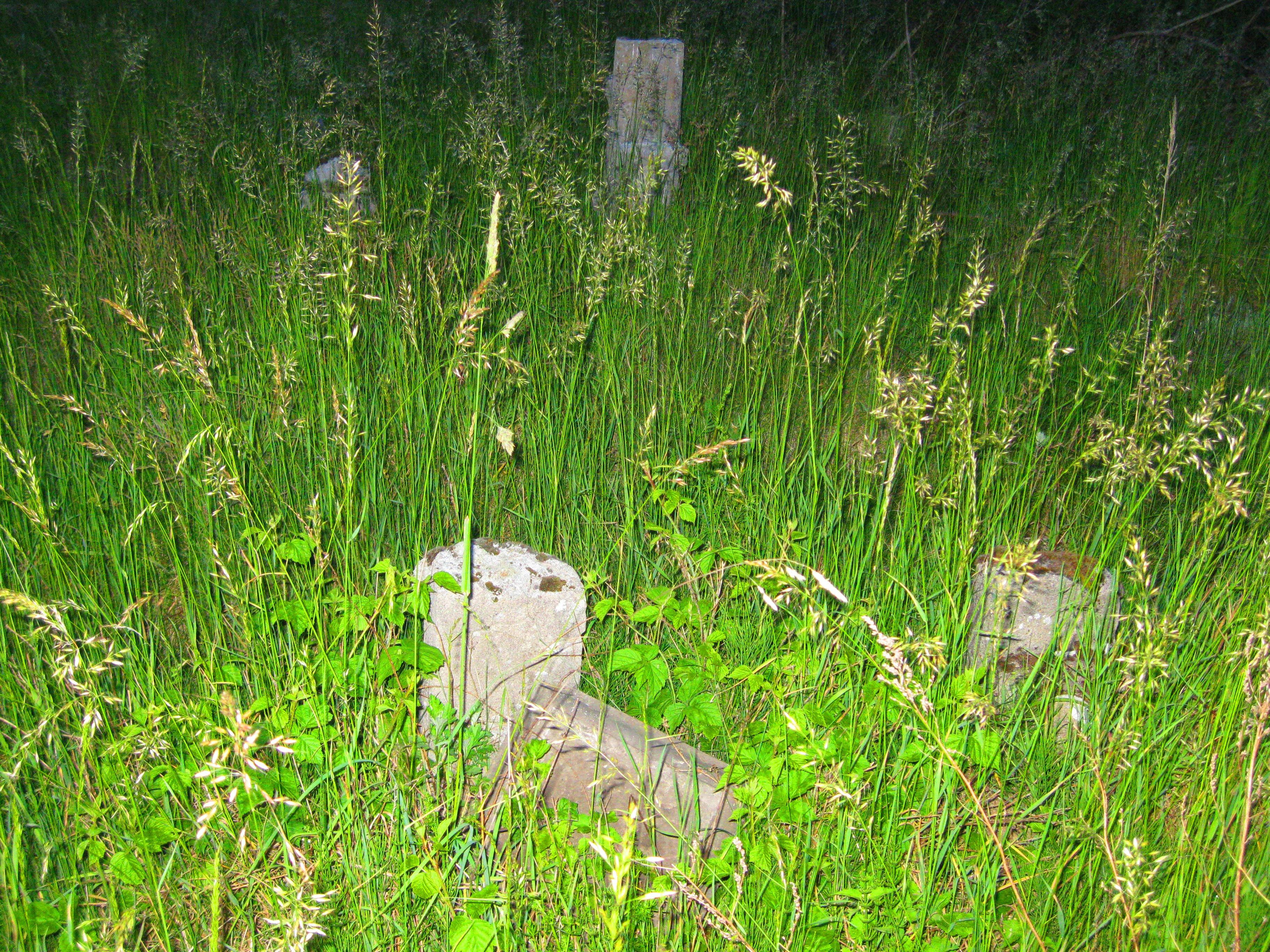 Pozostałości cmentarza niemieckiego w Nowym Lubuszu - gmina słubice, powiat słubicki, woj. lubuskie.